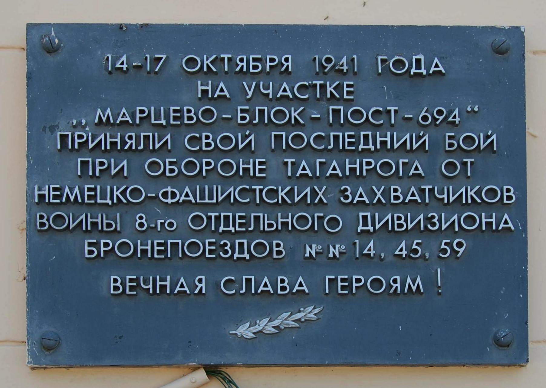 Мемориальная табличка на здании железнодорожного Нового вокзала, Таганрог